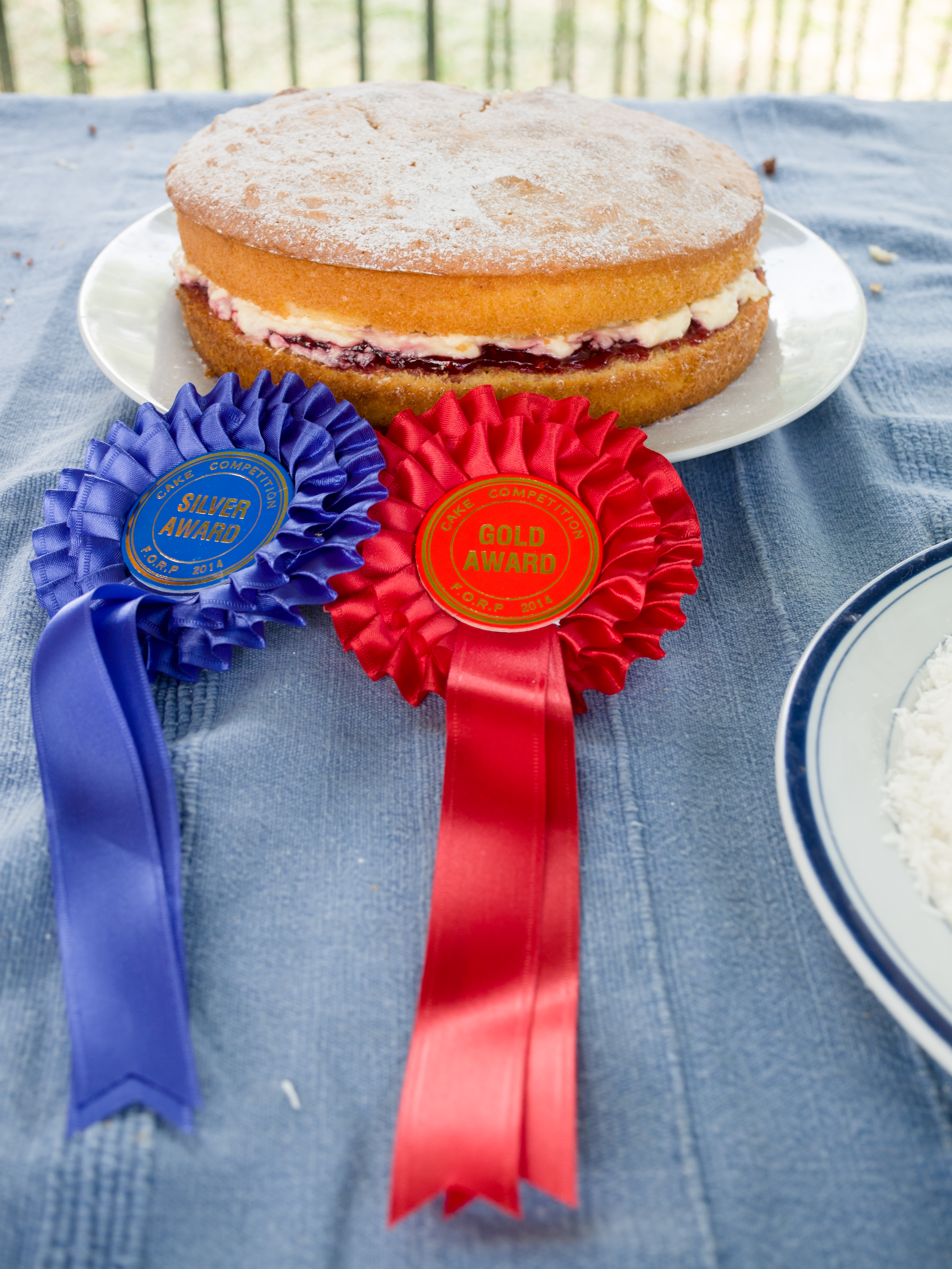 Ruskin Park fete 2014